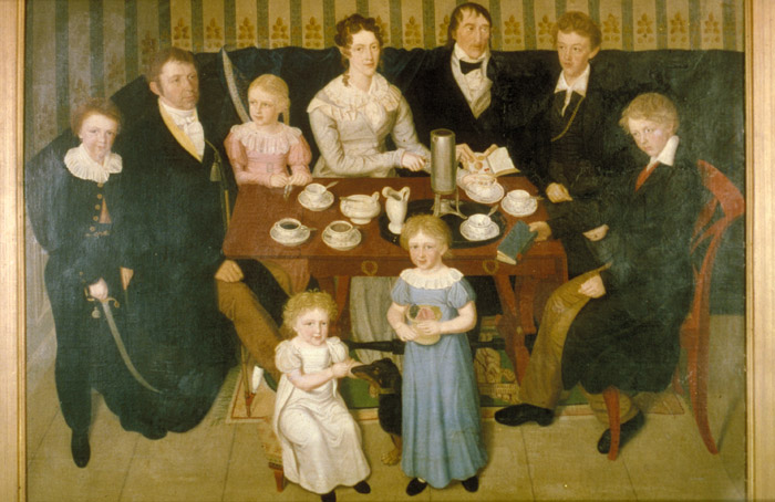 Vor dem Tisch: Friedrich (1824–1901) (links), Karoline (1822–1855) In der hinteren Reihe von links: Ernst (1819–1856), Ludwig (1747–1844, Vater) Wilhelmine (1817–1888), Eleonore von Syberg (1788-1826, Mutter), Friedrich von Syberg, Georg (1811–1875) und Gisbert (1813–1892)